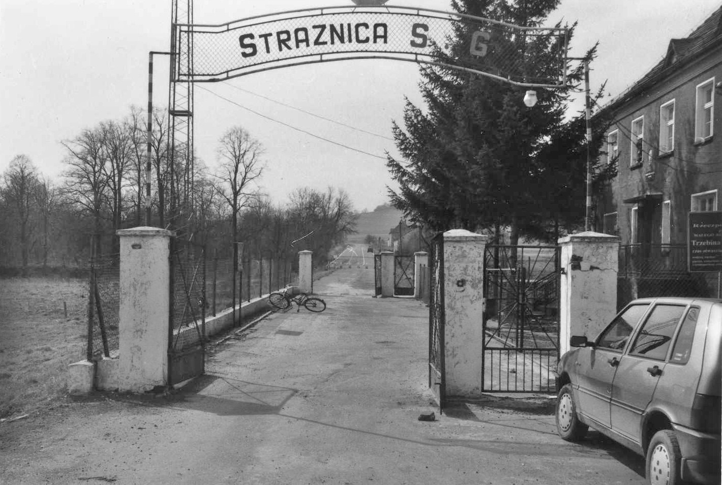 Przejście graniczne małego ruchu granicznego Trzebina-Bartultovive i Strażnica Straży Granicznej w Trzebinie.